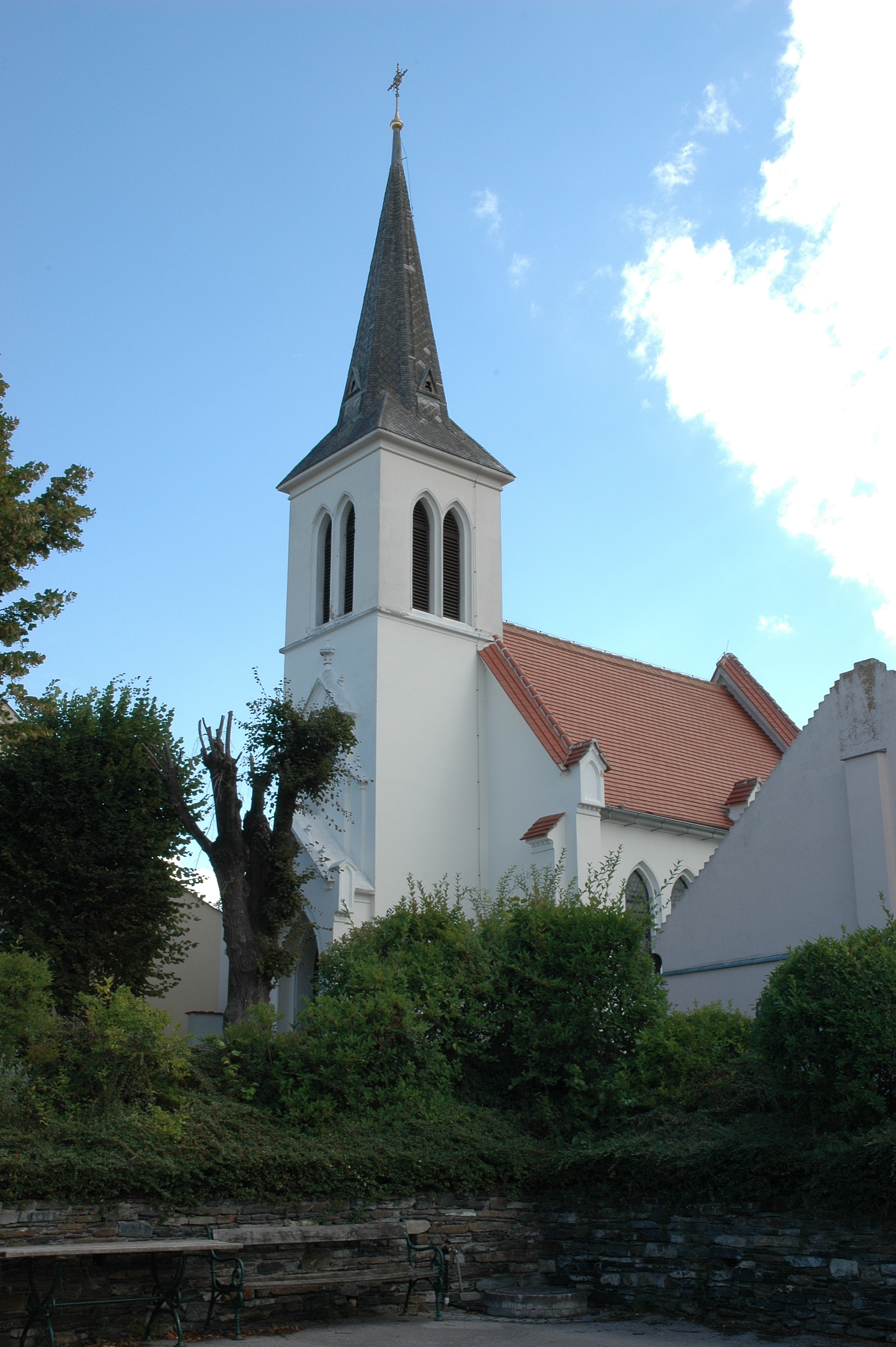 Kapelle Zum heiligsten Herzen Jesu in Gneisendorf - Krems